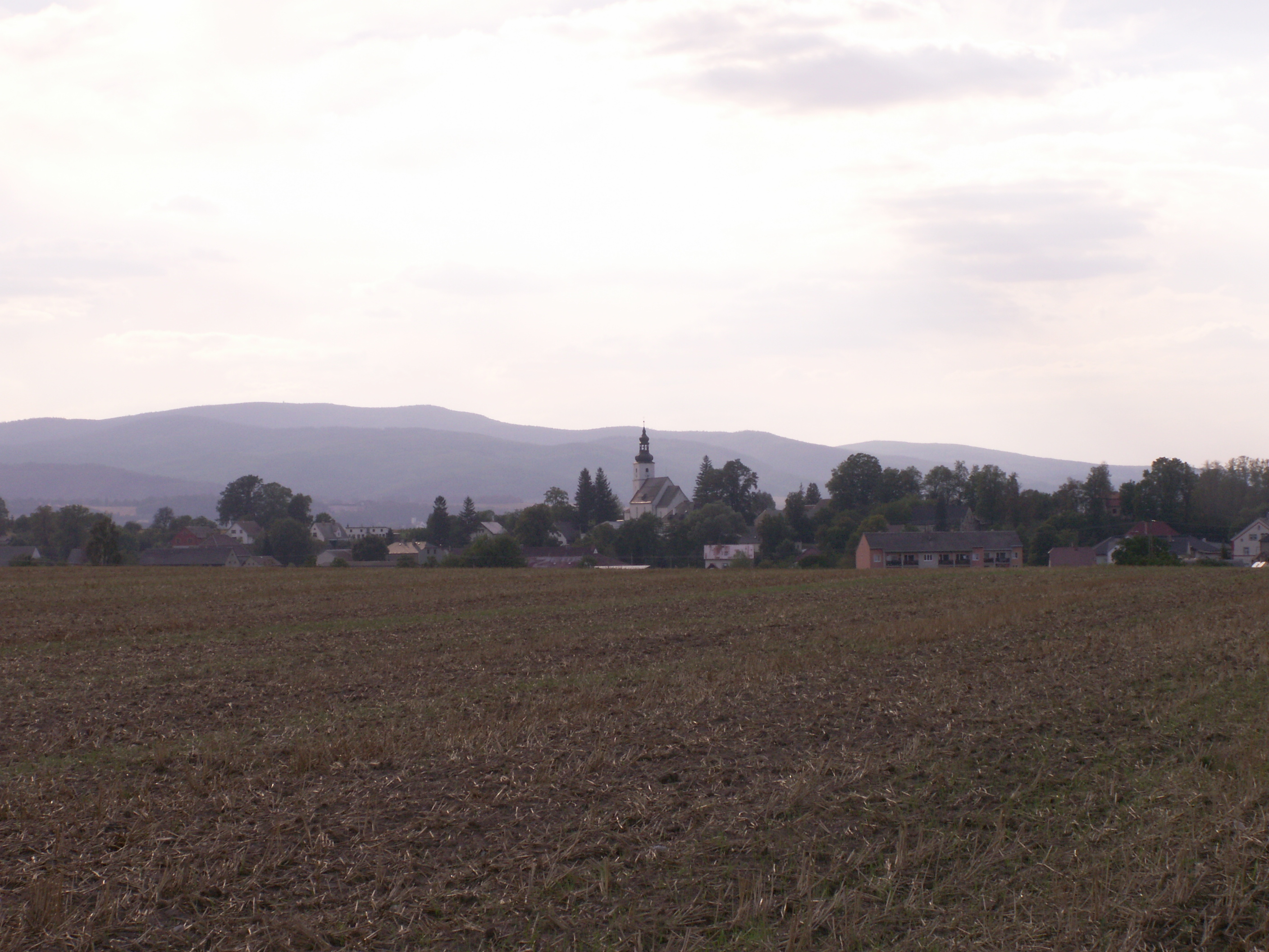 Bernartice, okres Jeseník, pohled na obec ze silnice č. 457 na Horní Heřmanice a Vidnavu